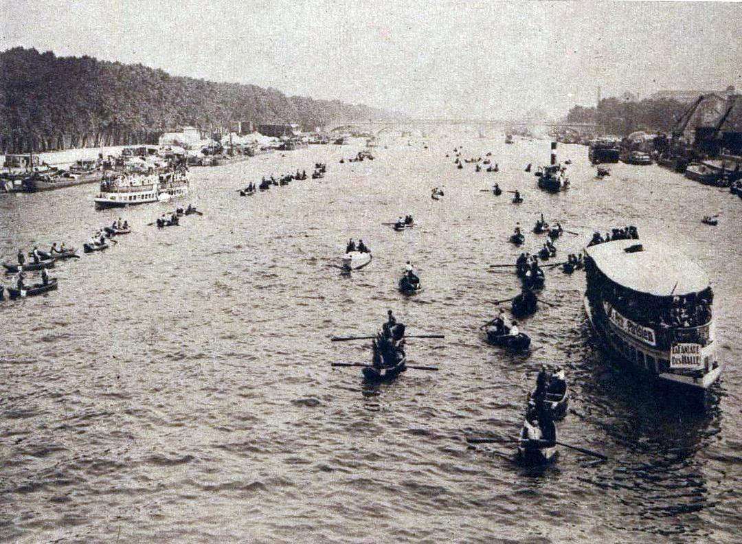 Barques et bateaux accompagnants de la Traversée de Paris à la nage, en août 1929 (au Pont de Bercy).